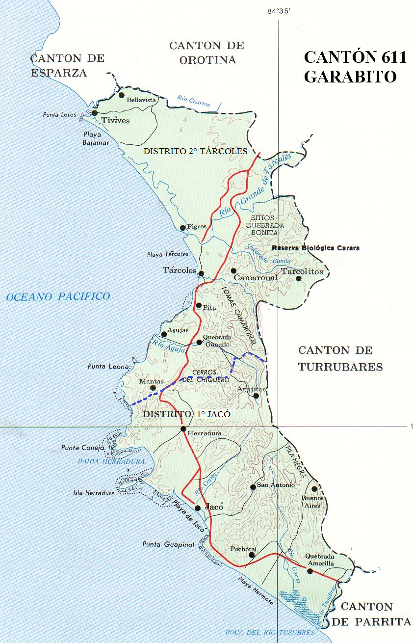 Mapa del Cantón de Garabito, Costa Rica